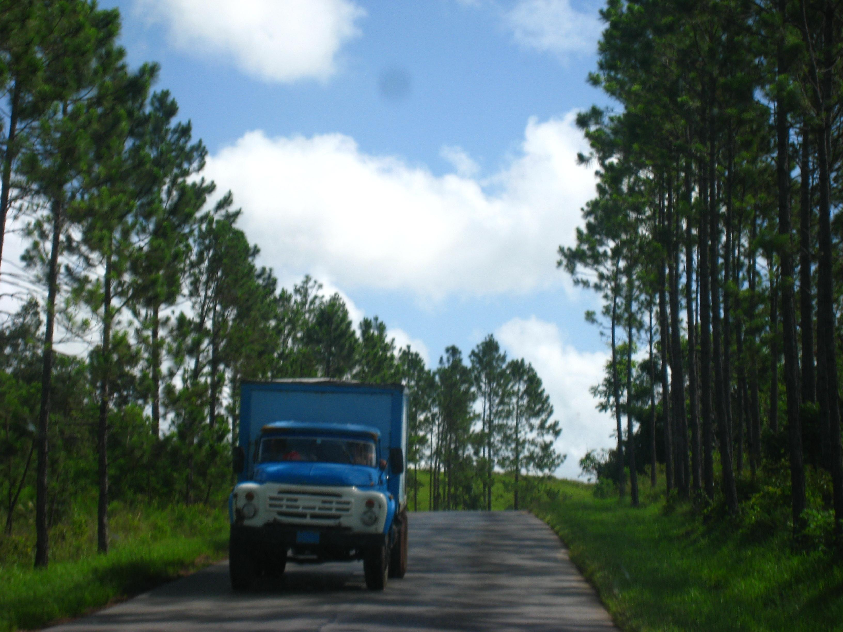 Pinus caribaea var. caribaea by roadside, Pinar del Rio, Cuba.